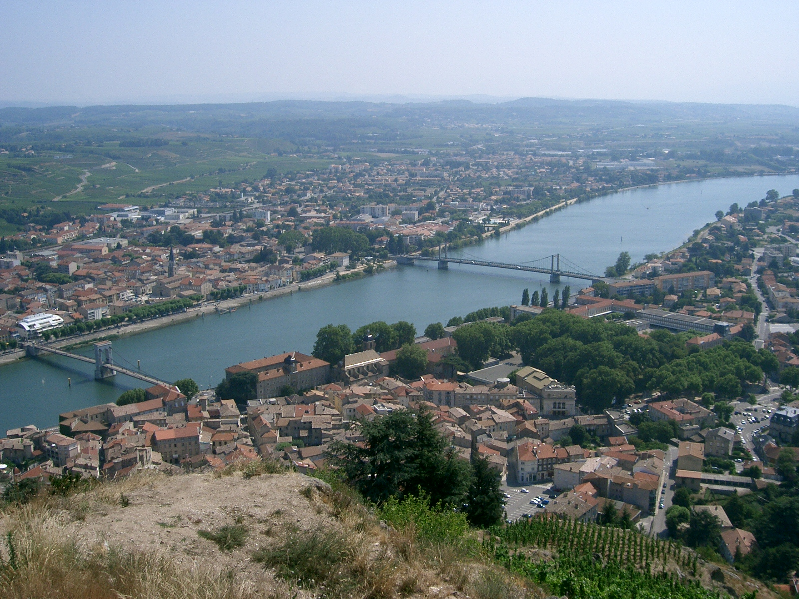 Tournon-sur-Rhône - Ardèche self made PRA